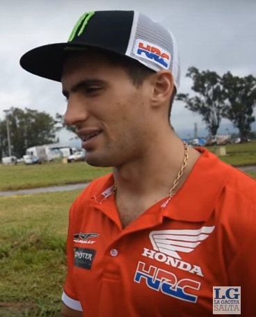 Dakar 2017. Kevin Benavídes.